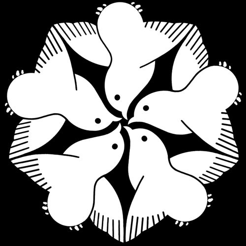 「五つ千鳥」紋（染抜）